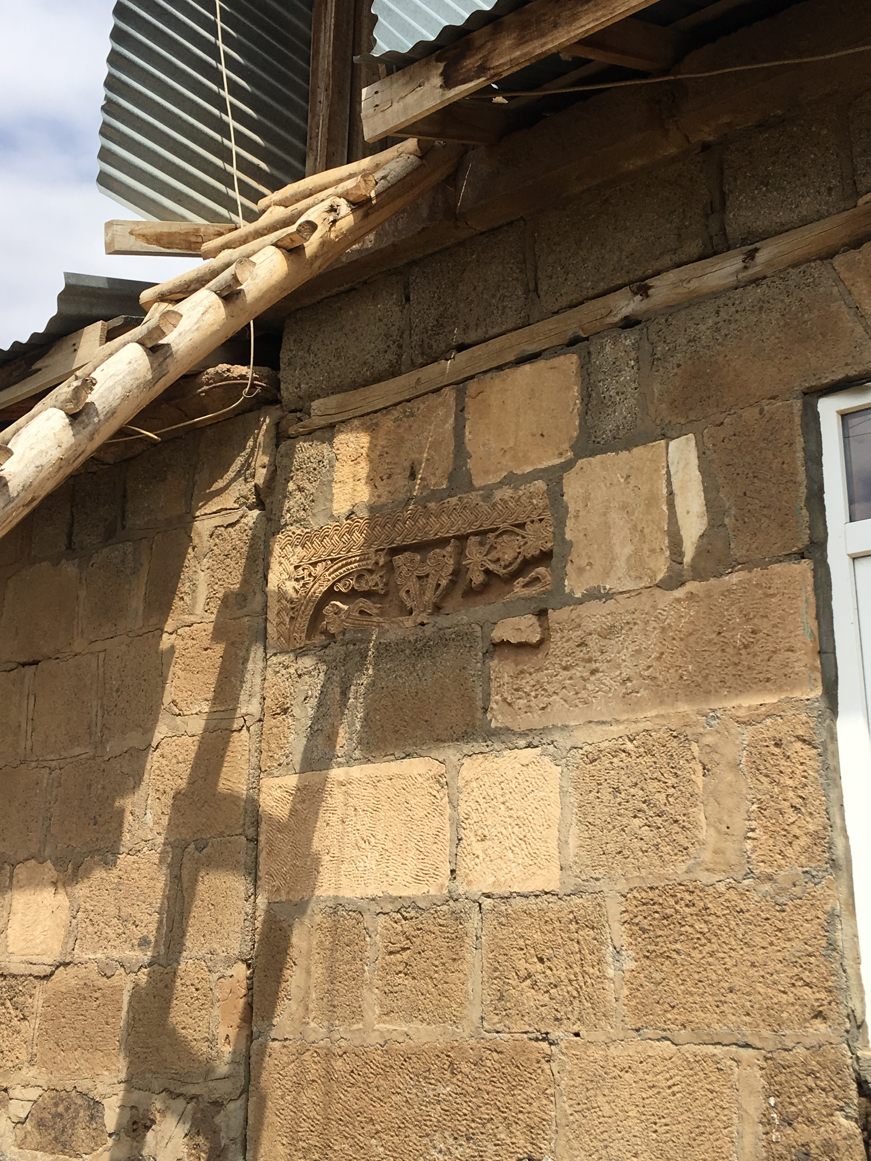 Մուշի նահանգի Յուքարըյոնգալը (Yukarıyongalı) գյուղի առանձնատներից մեկի պատերը՝ շարված Մշո Սուրբ Կարապետ վնաքի մնացորդներից: Վանքի ավերակները գտնվում են գյուղի կենտրոնում